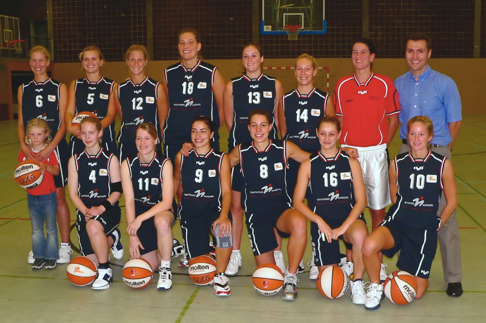 Mannschaftsphot des BC Marburg aus dem Jahr 2005